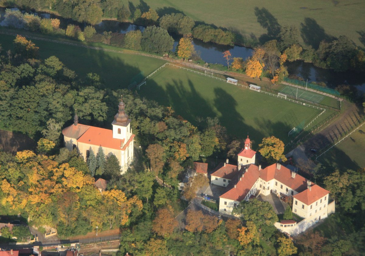 zámek Horky nad Jizerou